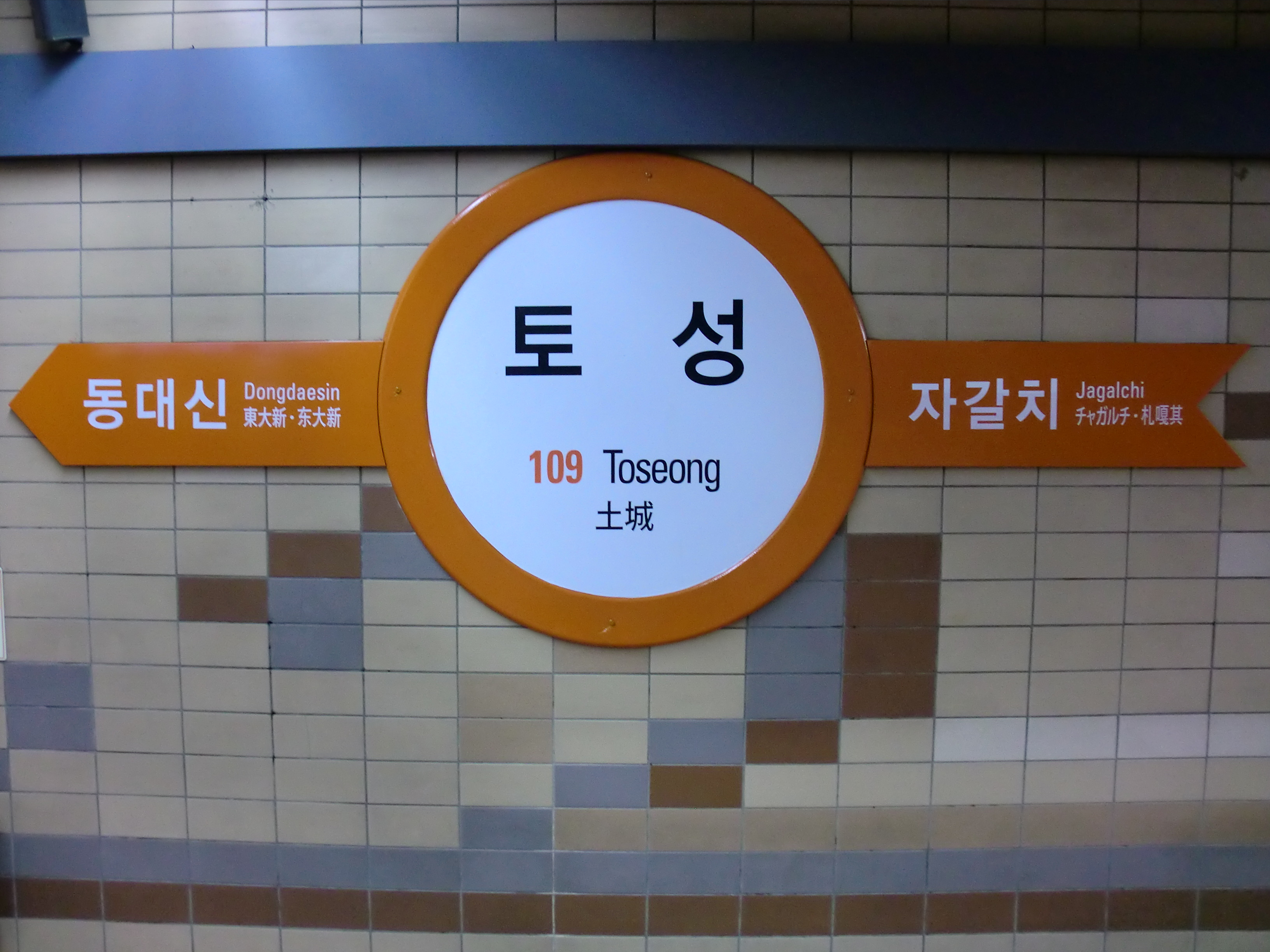 부산도시철도 1호선 토성역의 역명판